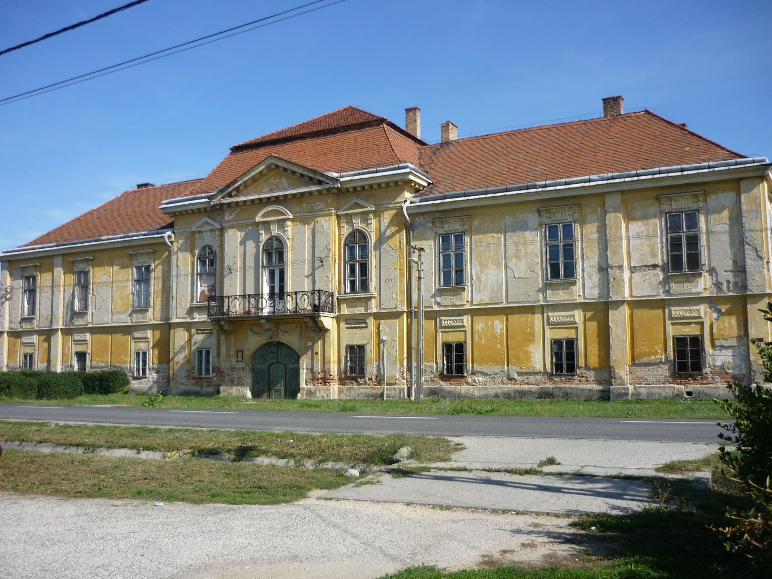 A váli Ürményi-kastély (Fejér megye, Magyarország)